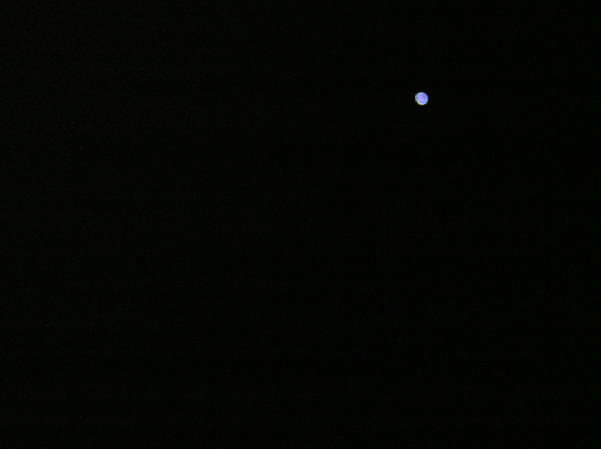 Svietiaca bublina sonoluminiscencie vytvorená na ÚEF SAV Košice pri 10s expozícii.